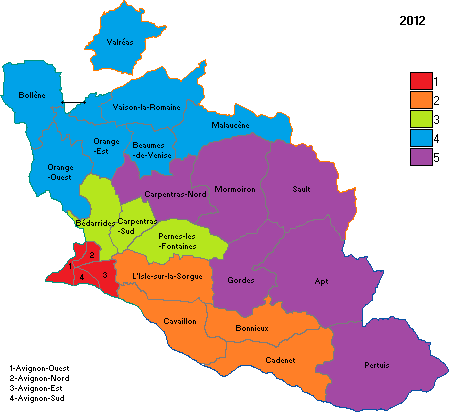 Circonscriptions du Vaucluse en 2012